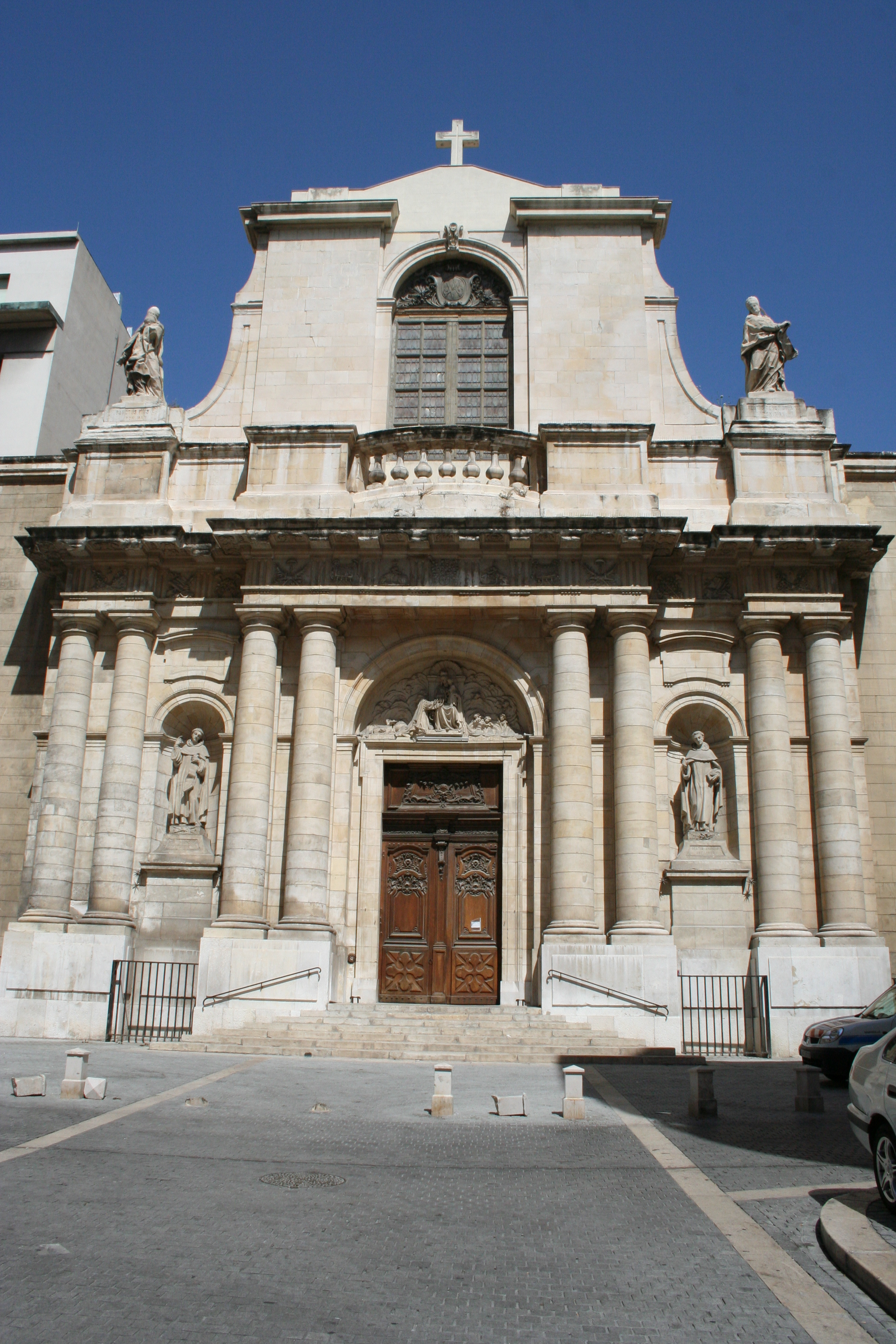 Façade de l'église saint-Cannat à Marseille.